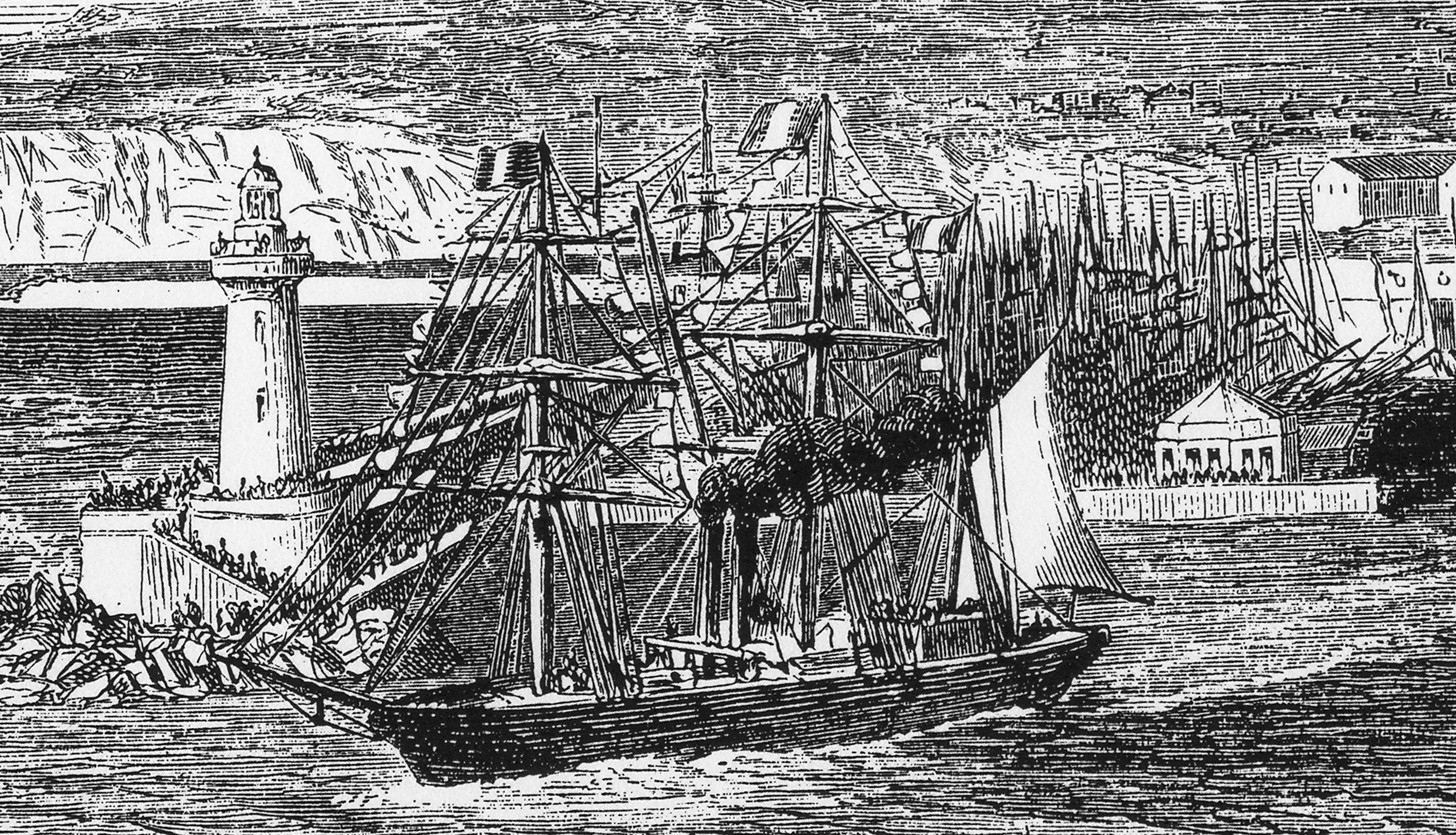 gravure de l'Illustration. 1er novembre 1861